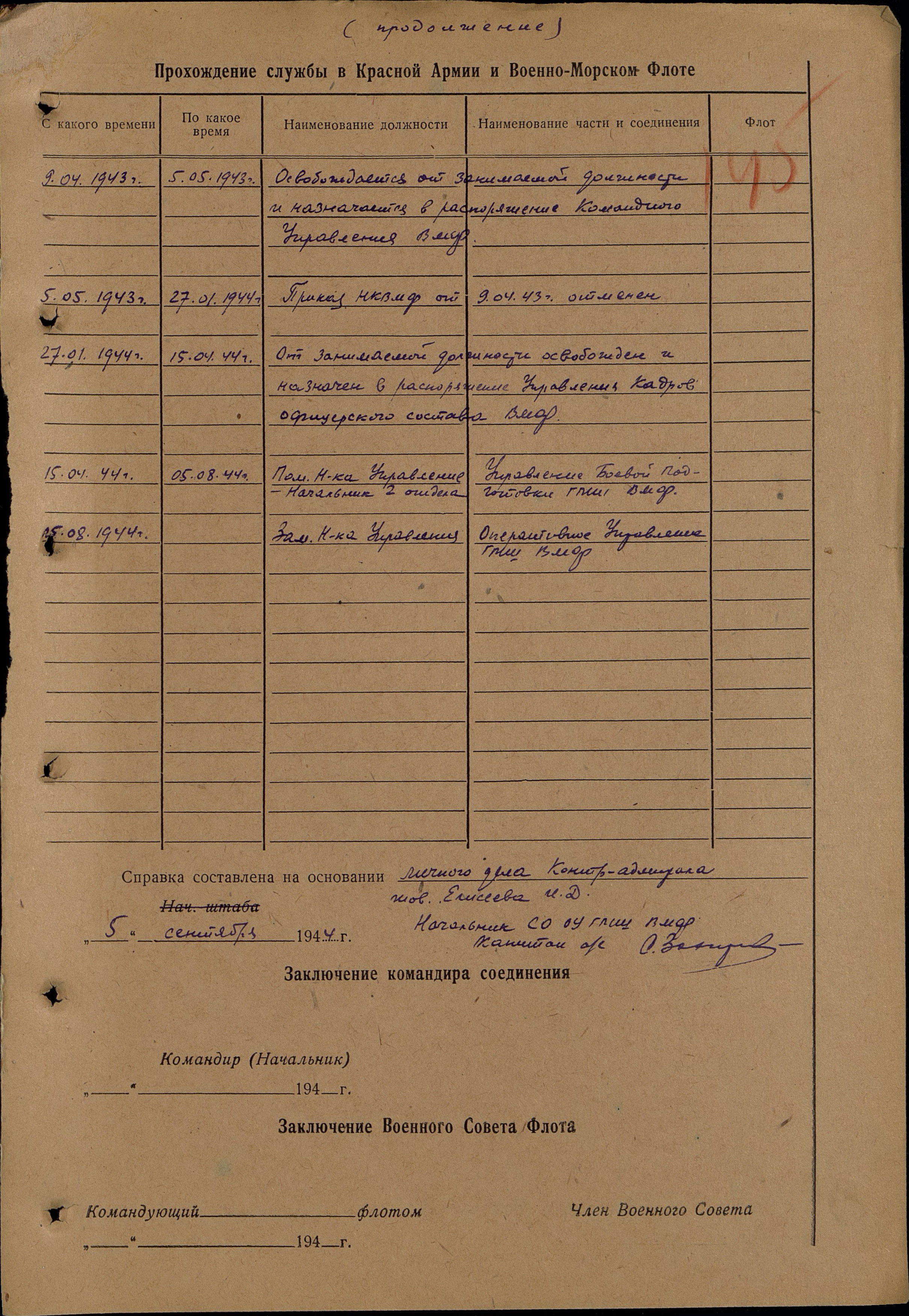 Официальный документ государственных органов